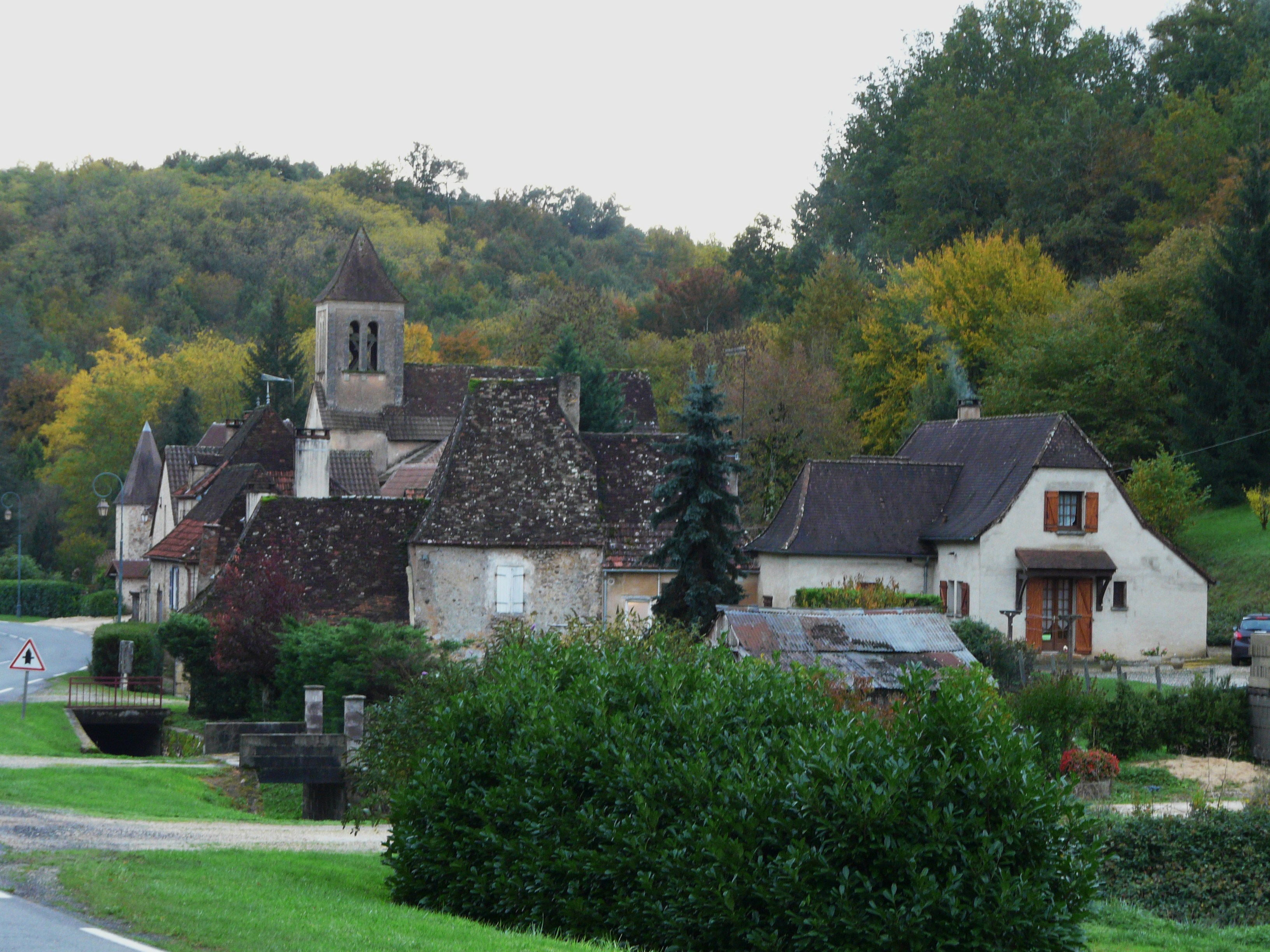 Le village de Saint-Félix-de-Reillac, Saint-Félix-de-Reillac-et-Mortemart, Dordogne, France.